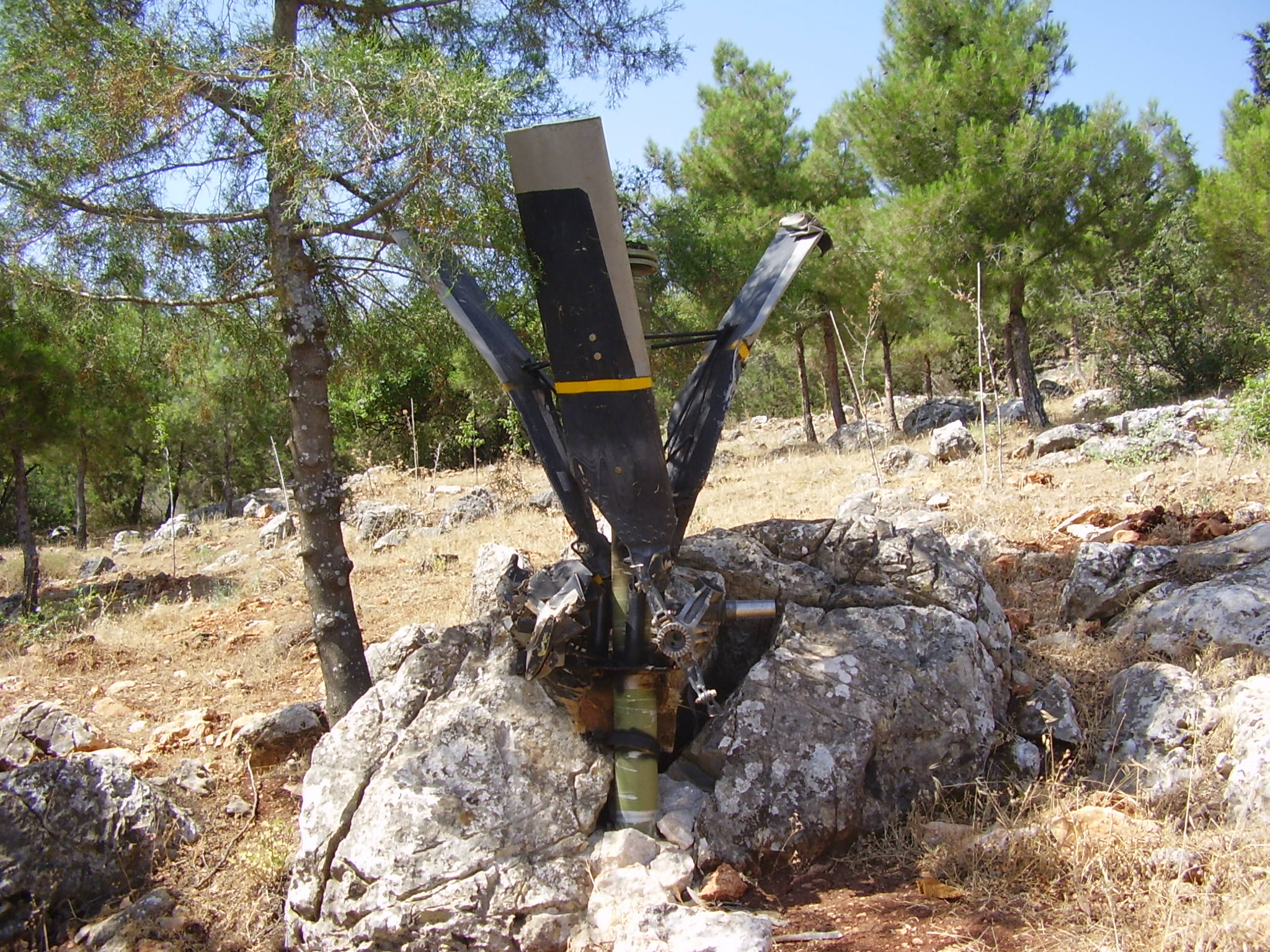 הרוטור של מסוק האפאצ'י במצפה רן ע"ש רס"ן רן כוכבא בגליל העליון רישיון נוצר על ידי משתמש:Avi1111